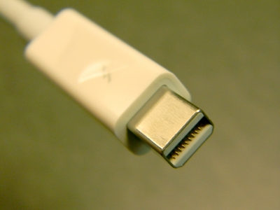 Connecteur Thunderbolt